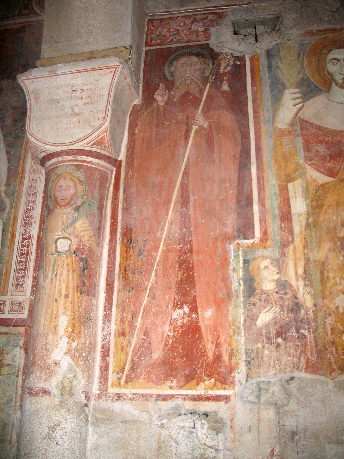 Sant'Antonio Abate; affresco attribuito al cosiddetto "Maestro del 1388" e datato alla fine degli anni '80 del XIV secolo. Chiesa di San Giorgio in Lemine (ad Almenno San Salvatore, Bergamo). Fotografia di Giorces.